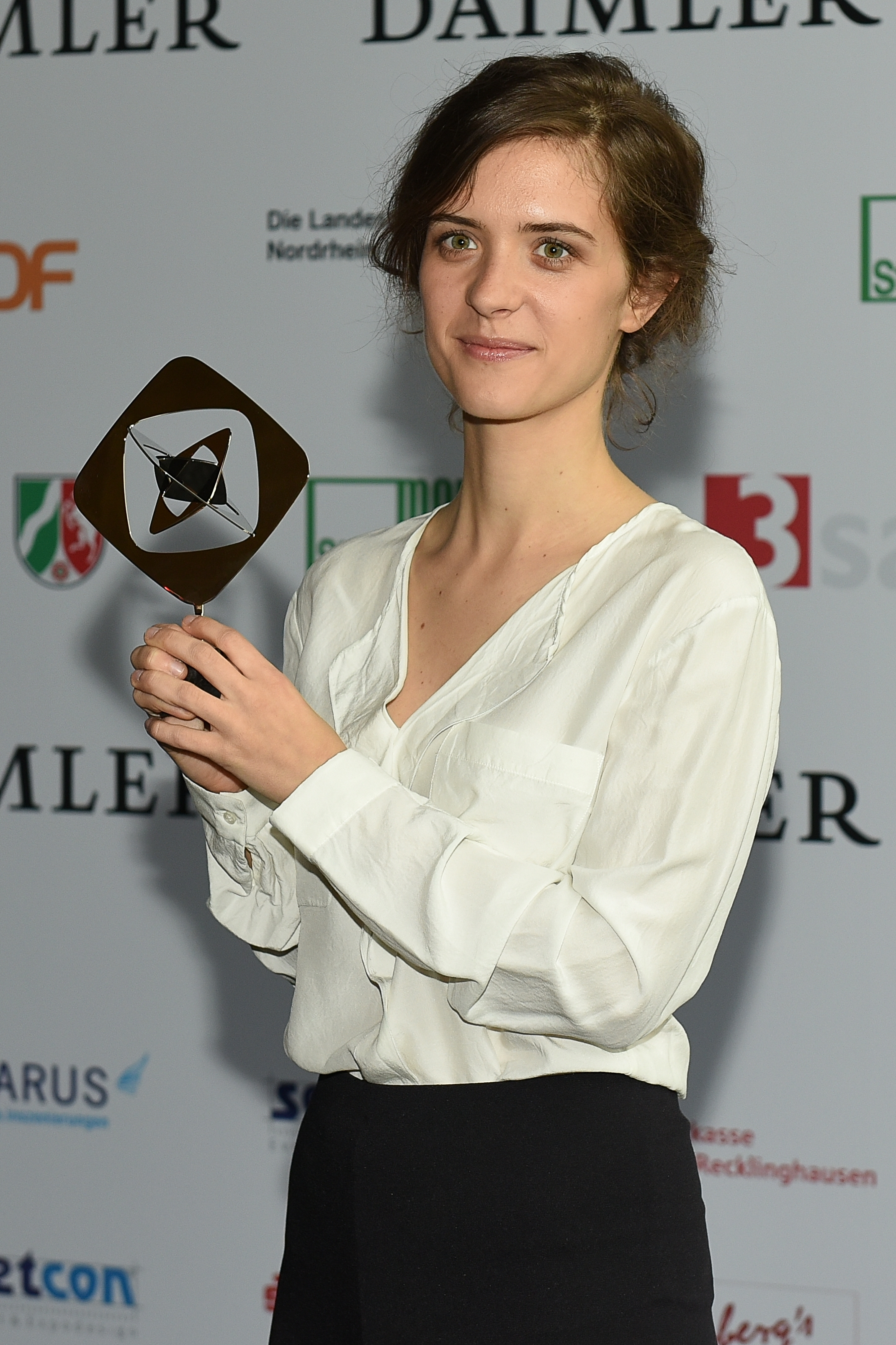 Verleihung des Grimme-Preises 2018.